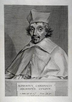 Alphonse Louis du Plessis de Richelieu (gravure d'Abraham Bosse 1602 - 1676) BNF